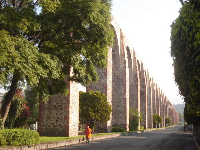 Acueducto de Querétaro en Santiago de Querétaro, Querétaro, México.